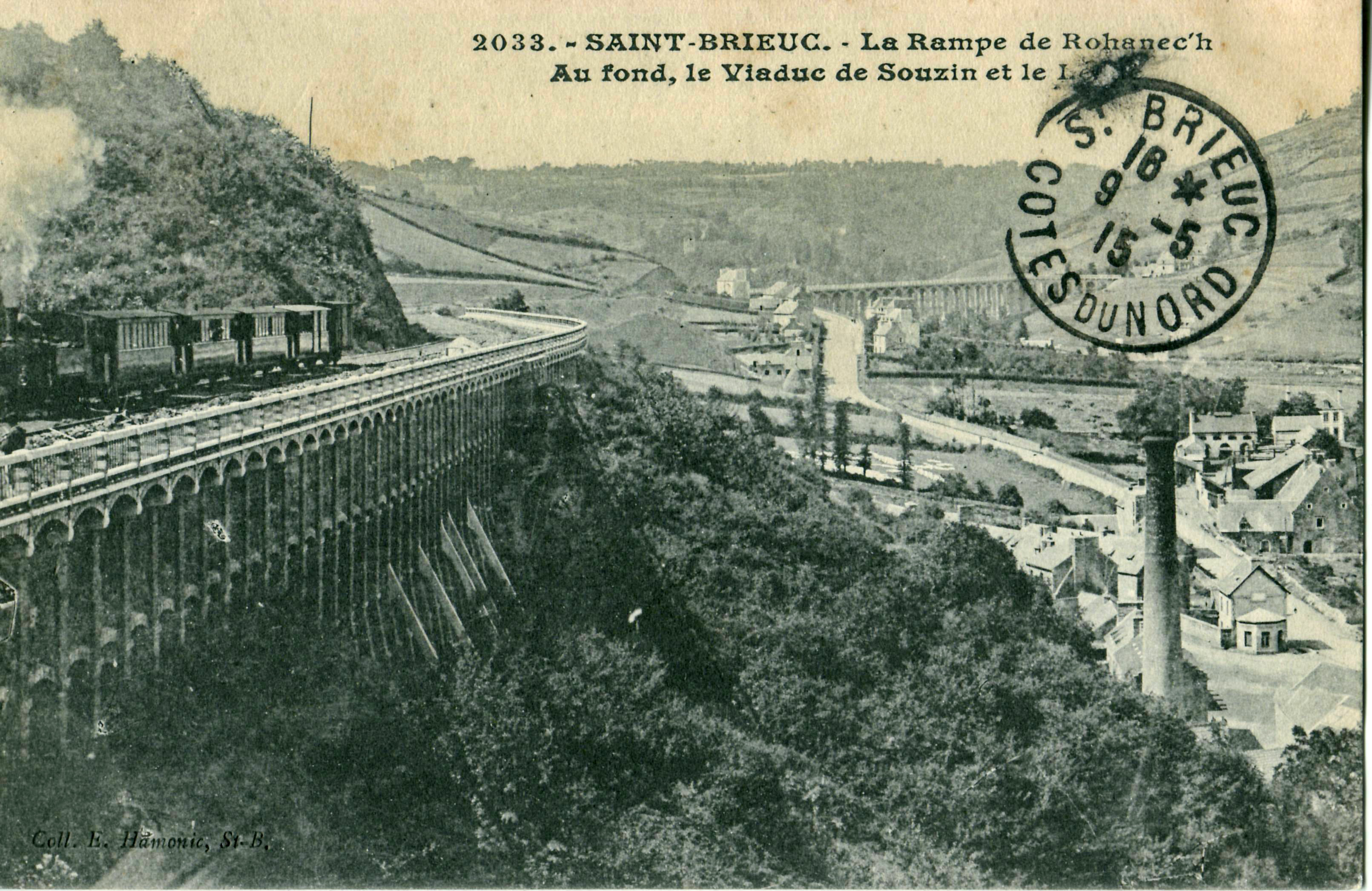 Carte postale ancienne éditée par E. Hamonic à Saint-Brieuc, n°2033 :SAINT-BRIEUC - La Rampe de Rohanec'h - Fonds, le viaduc de Souzin et le Légué